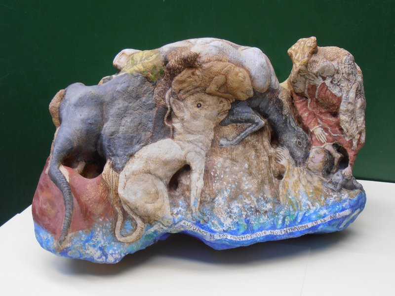 Some of the Animals the Get onto the Ark A - 29x19x17 - 2010